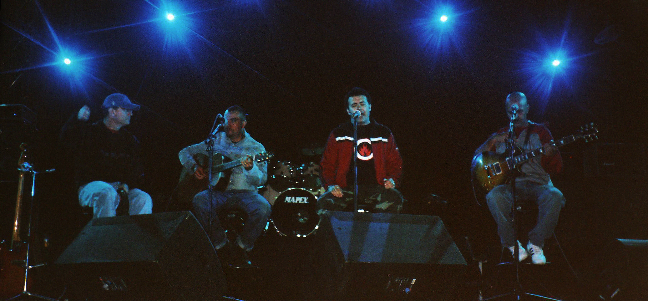 Concierto presentación Otros Mares